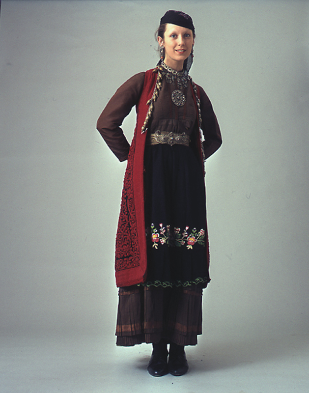 Γυναικεία φορεσιά από την περιοχή Ζαγορίου. Το παλαιότερο κομμάτι της φορεσιάς είναι η "φλοκάτα", αμάνικο μακρύ πανωφόρι κεντημένο με κόκκινα κορδονέτα. Συλλογή Πελοποννησιακού Λαογραφικού Ιδρύματος, Ναύπλιο